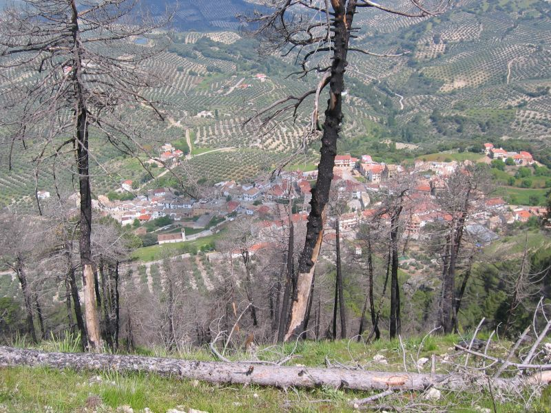 Burunchel desde el Incendio